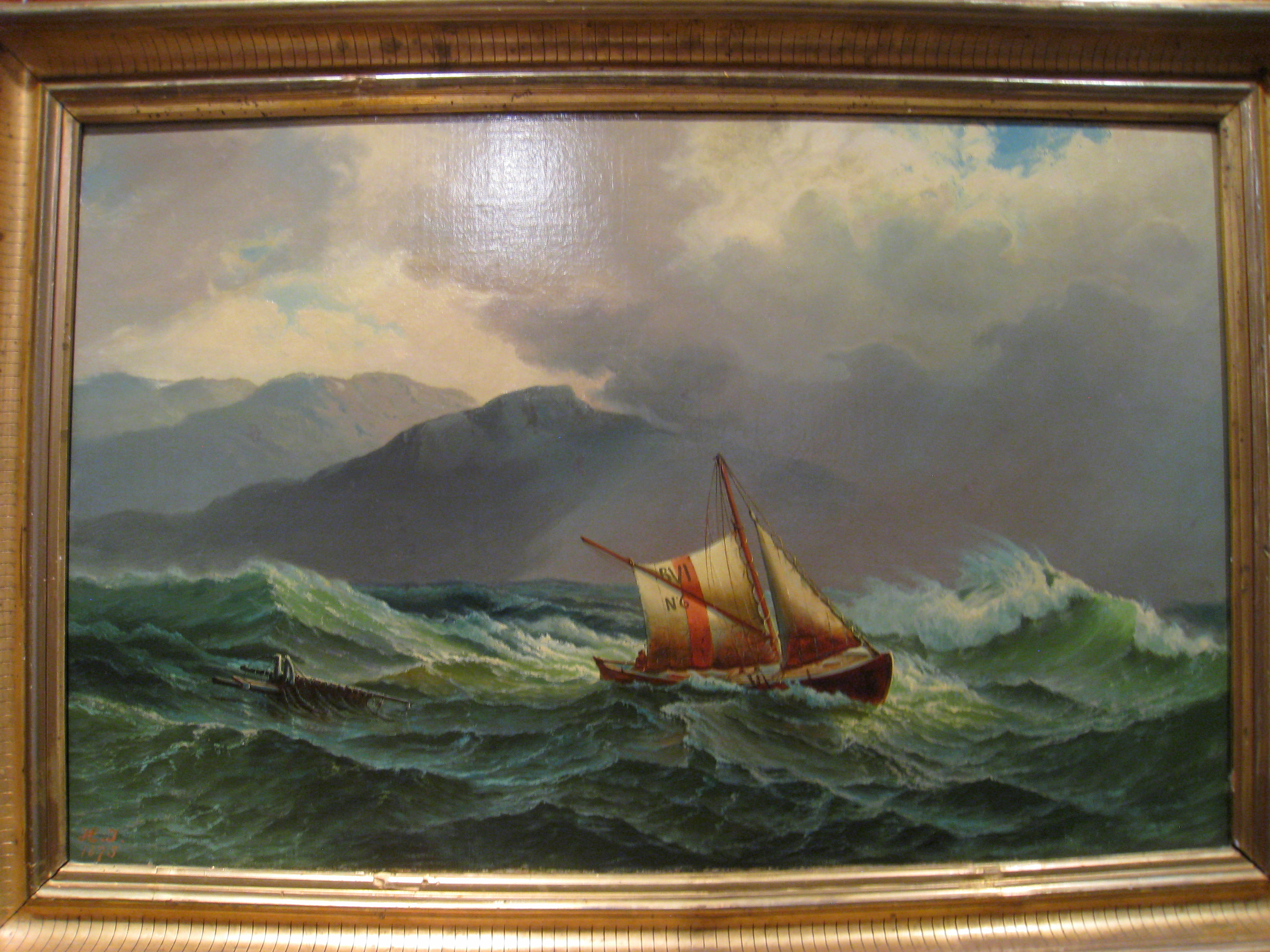 Losbåt I Høy Sjø